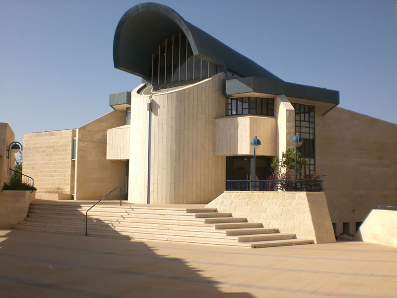 Sinagoga de Alon Shevut, Israel